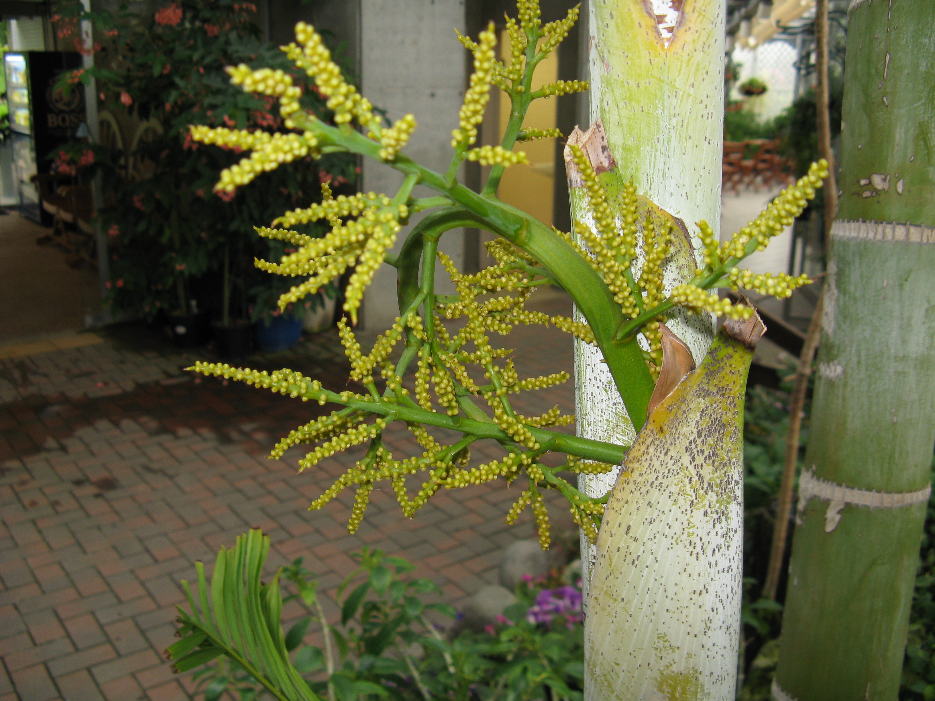 Scientific name Dypsis lutescens